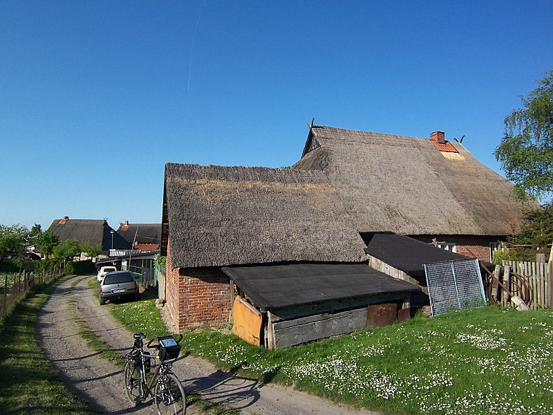 Dorfstraße in Fischerdorf Hoben